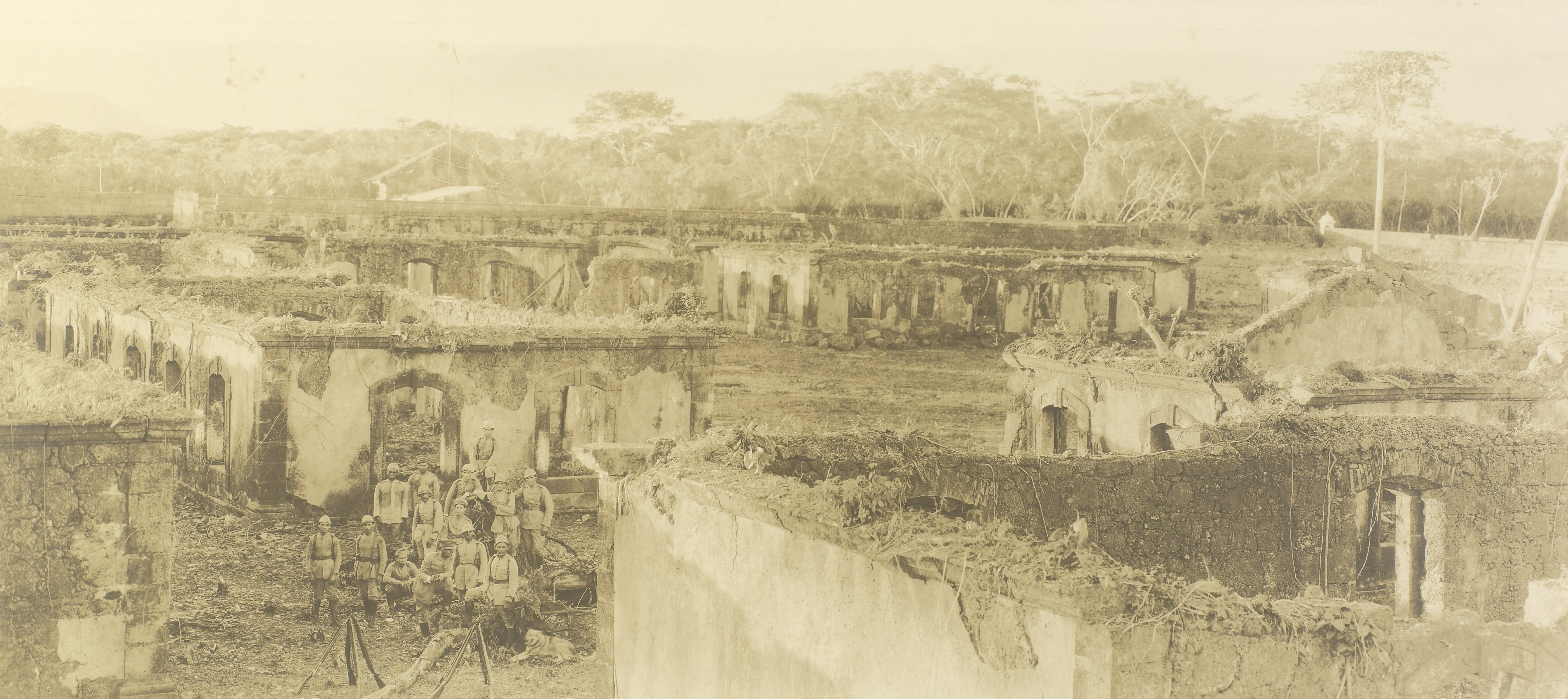 Imagem do Fundo Ministério da Guerra, do Arquivo Nacional